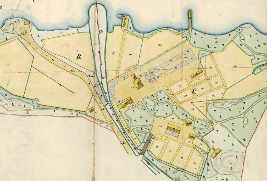 Karta över Stocksundstorps gård